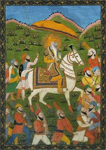 Ranjit_Singh, ca 1835 - 1840